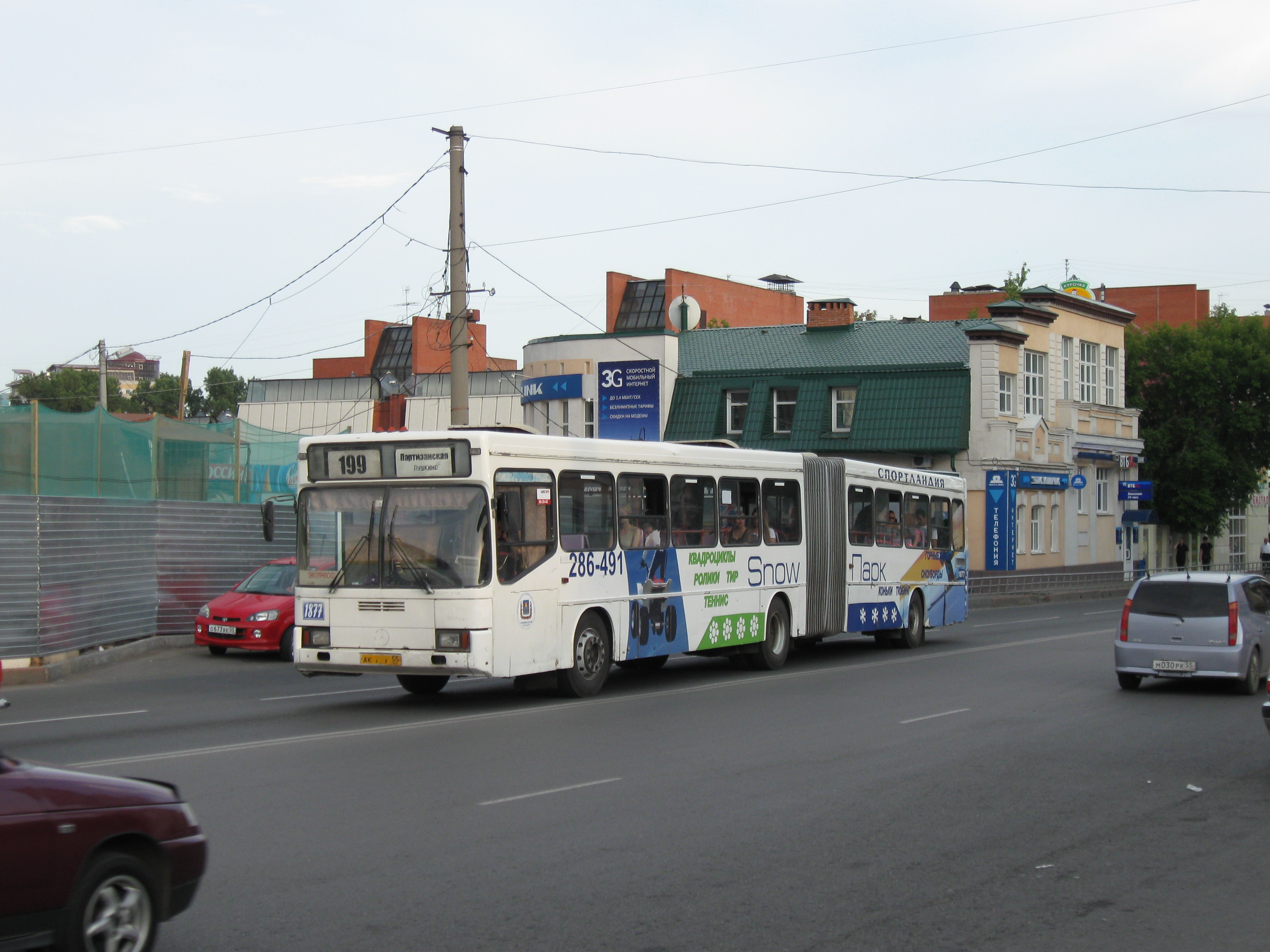 Автобус ГолАЗ маршрута 199 на ул. Герцена в Омске.